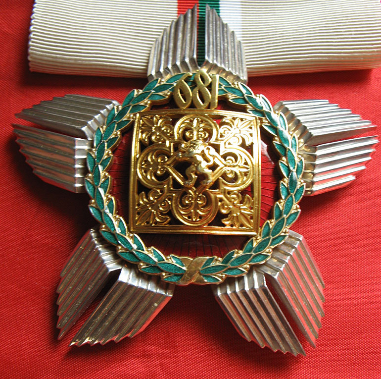 Орден_„13_века_България“_звезда_на_ордена